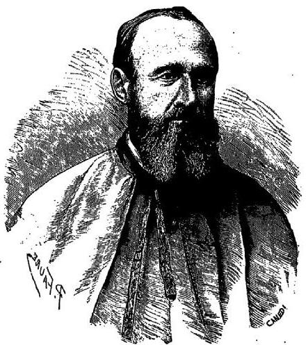 Gravure représentant le RP Victor-Marie Guilloux, missionnaire à Madagascar, préfet apostolique des Petites Iles malgaches (Mayotte, Nossi-Bé, etc...)